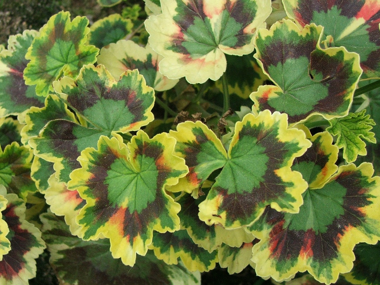 Pelargonium ×zonale hort.